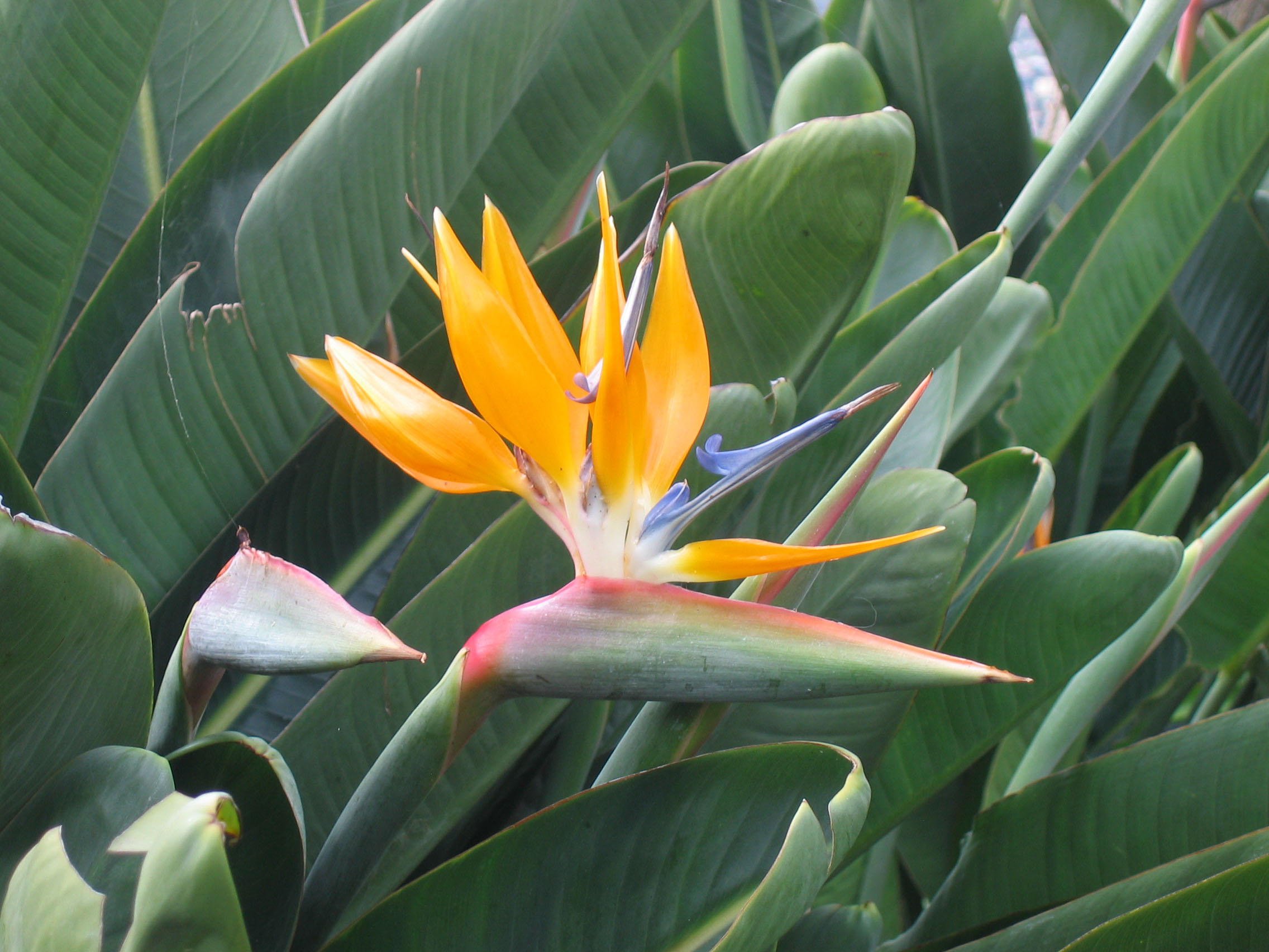 papegøjeblomst